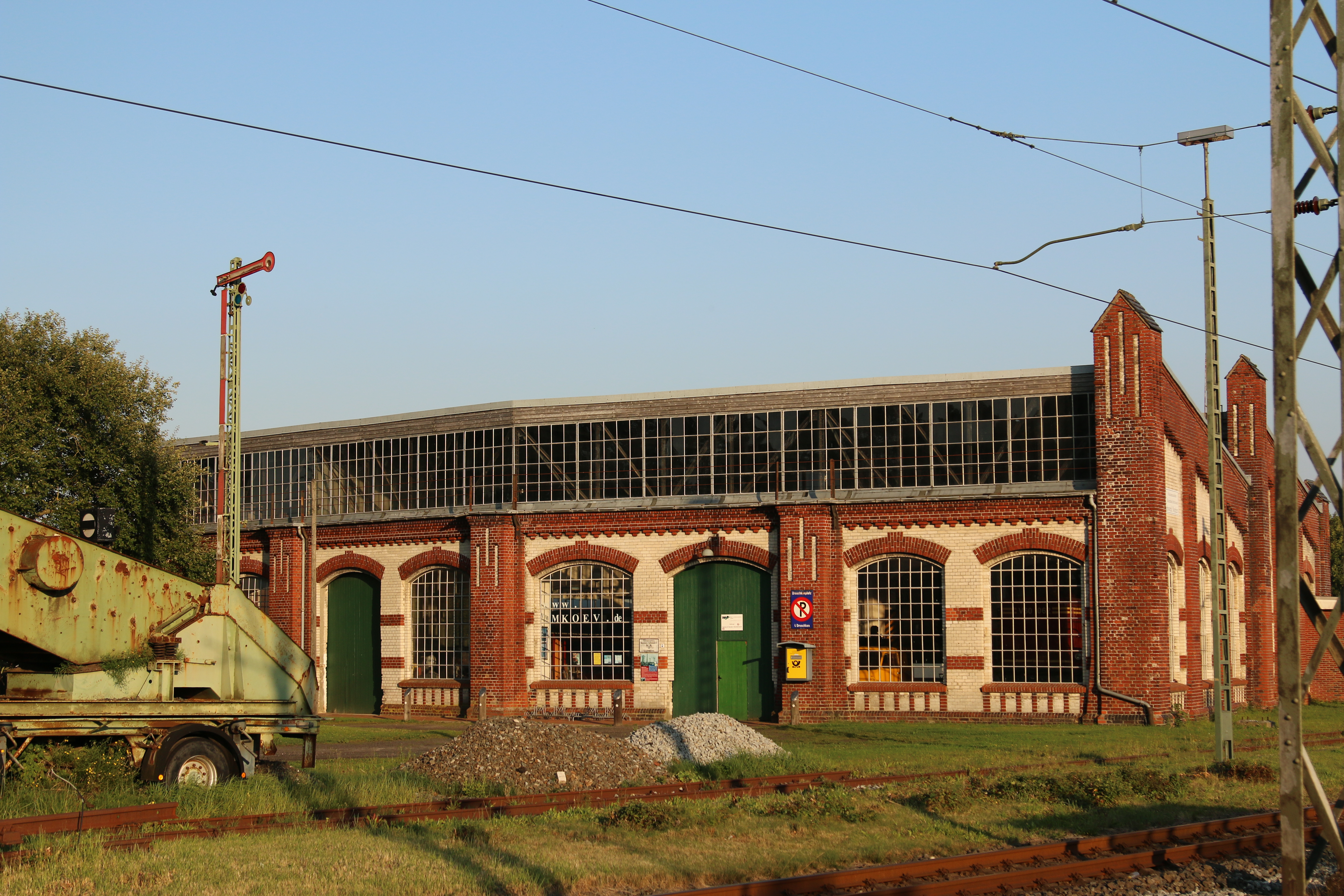 Denkmalgeschützter Lokschuppen der MKO in Norden